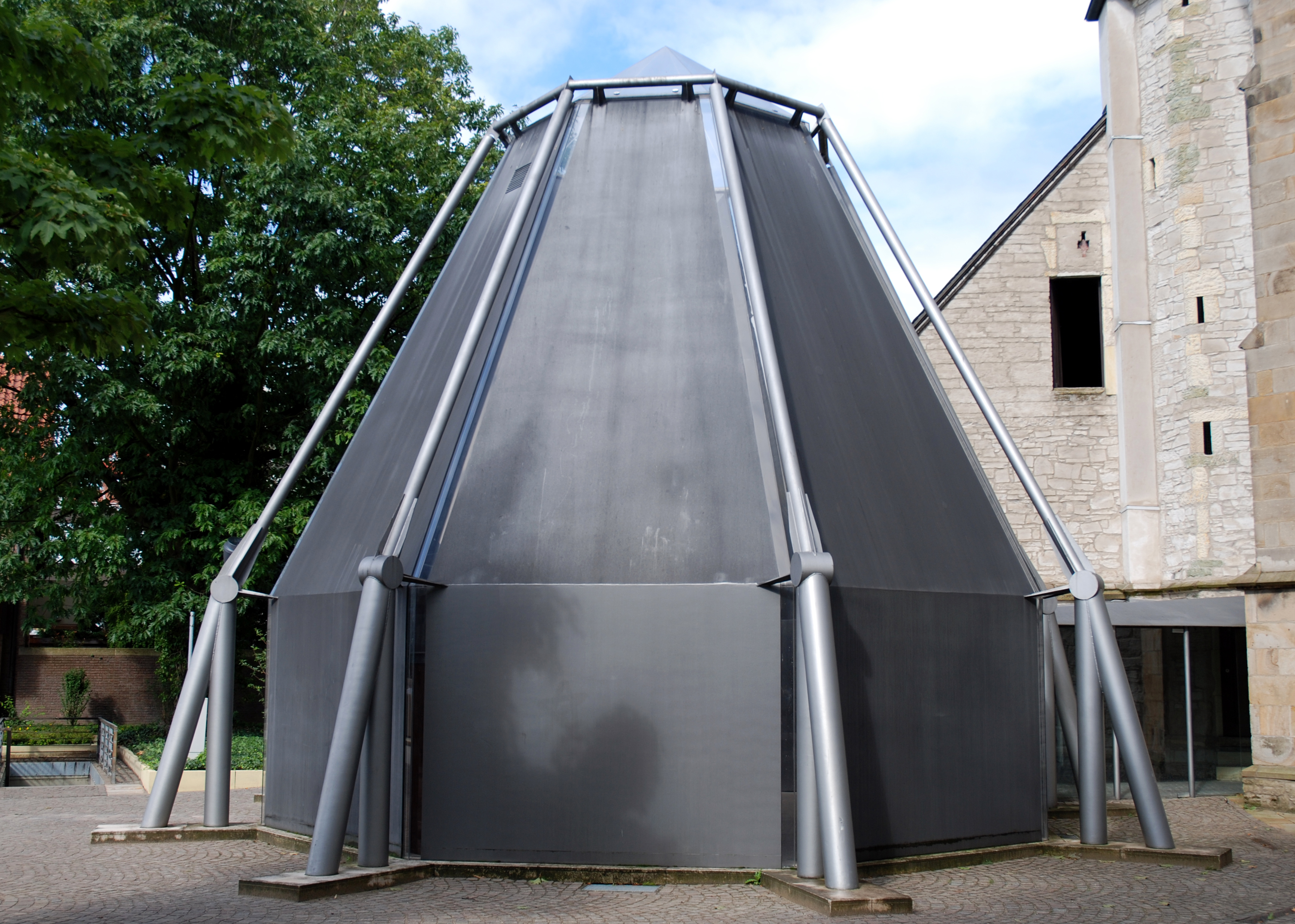 Werne, Kath. Pfarrkirche St. Christophorus, ehem. St. Johannes Bapt., im Vordergrund Sakristei